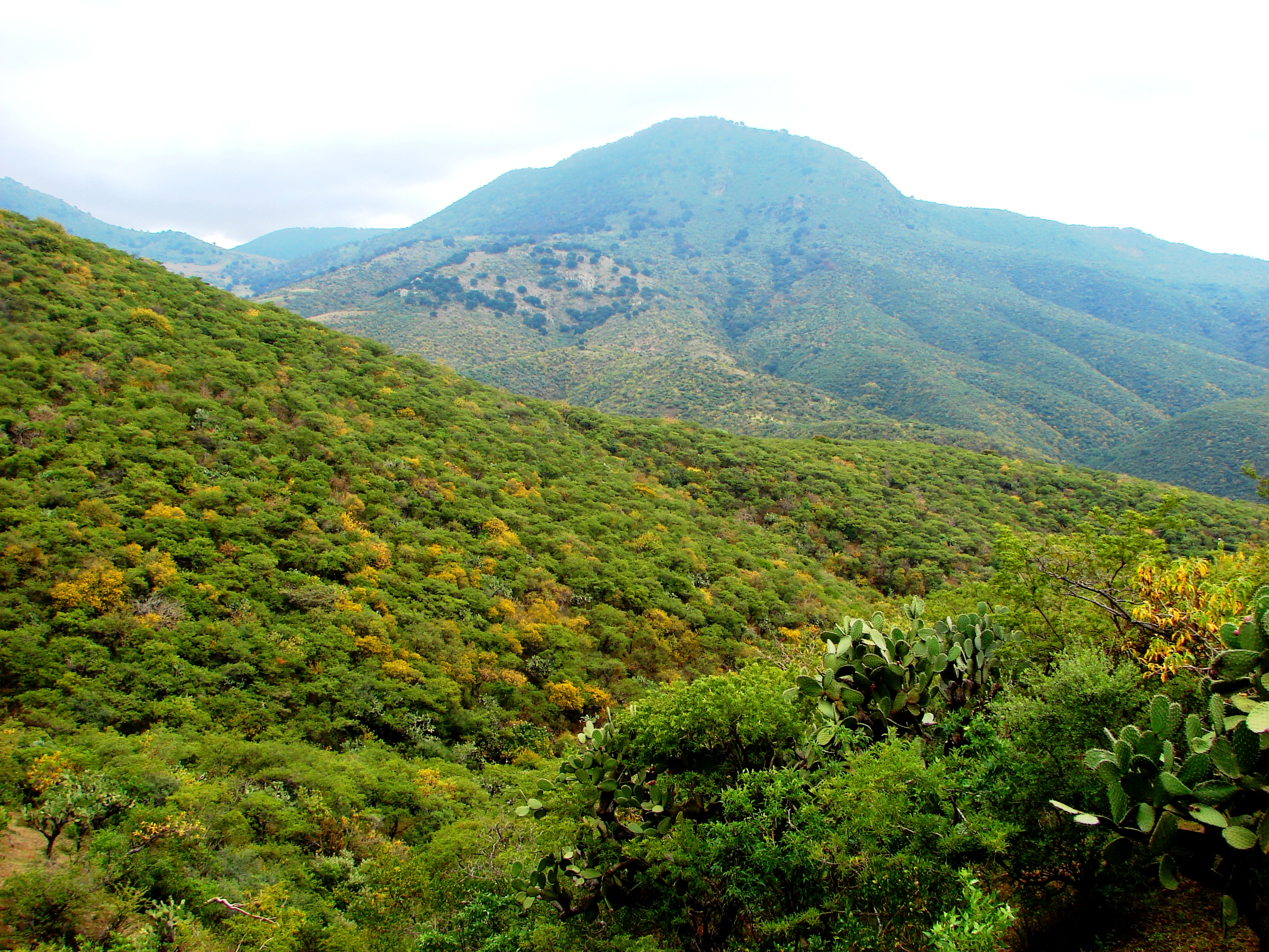 Matorral Subtropical en León, Gto. (Otoño)